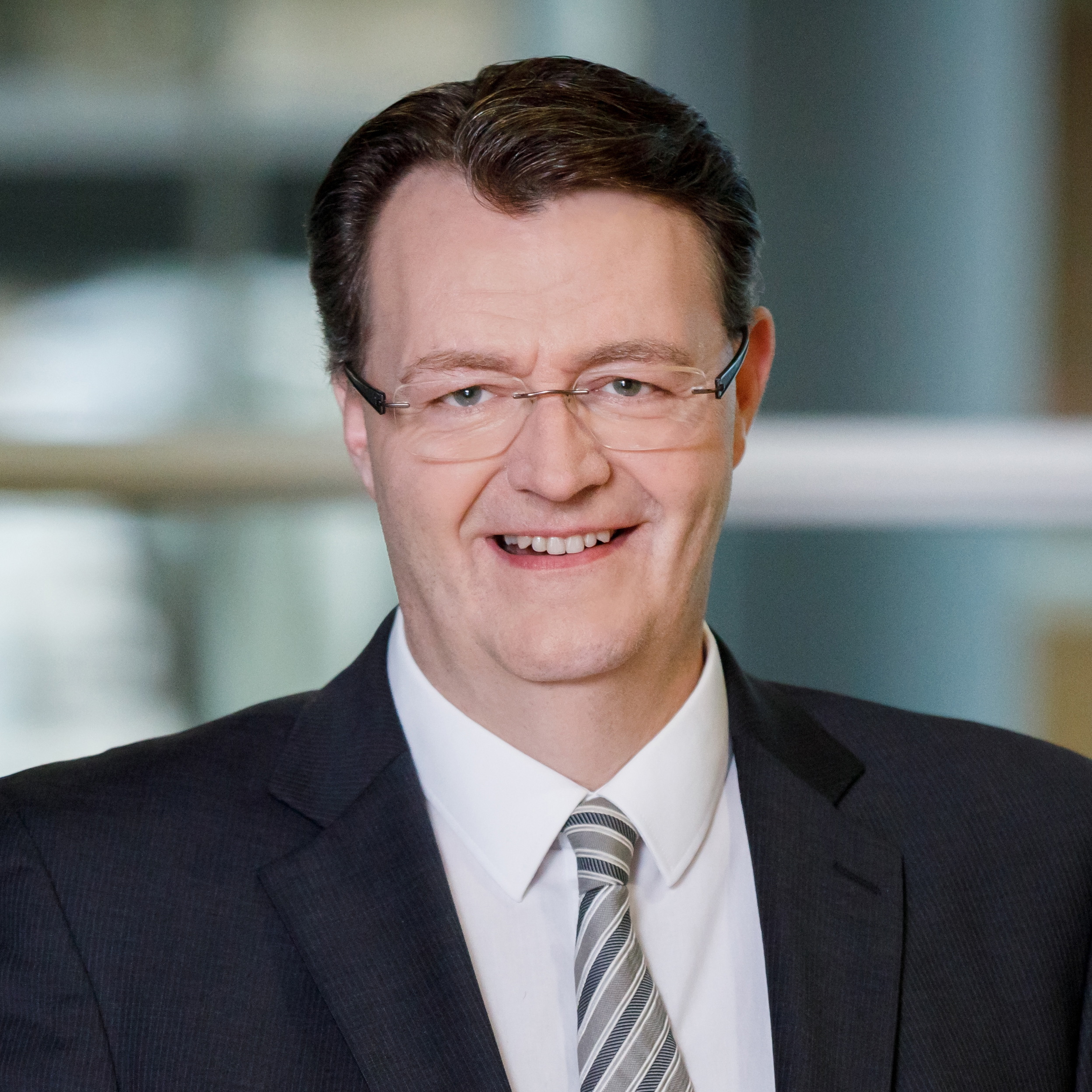 Michael Frieser am 26.06.18 in Berlin im Deutschen Bundestag. / Foto: Tobias Koch (